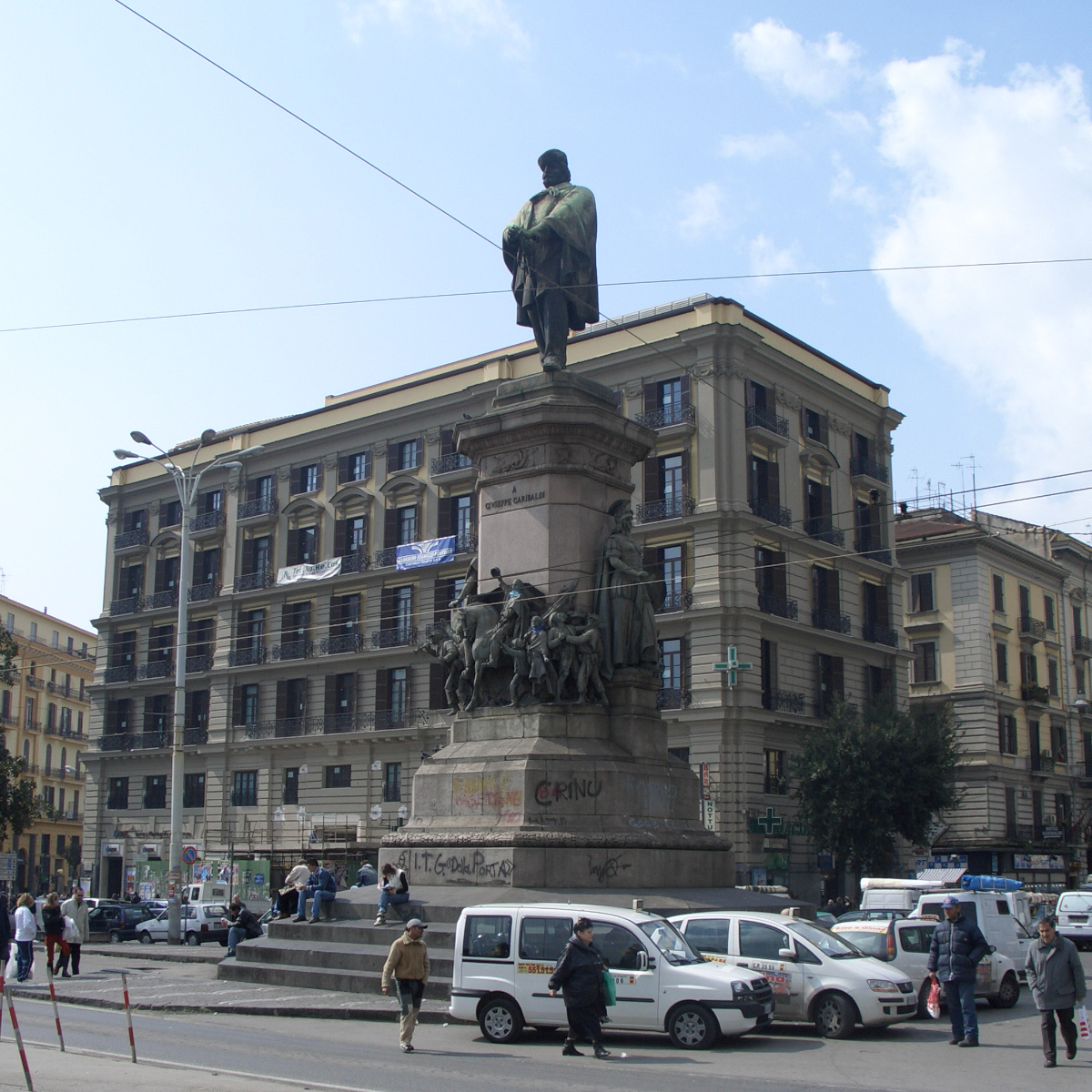 Napoli, Italia:piazza e monumento a Garibaldi9050_garibaldi